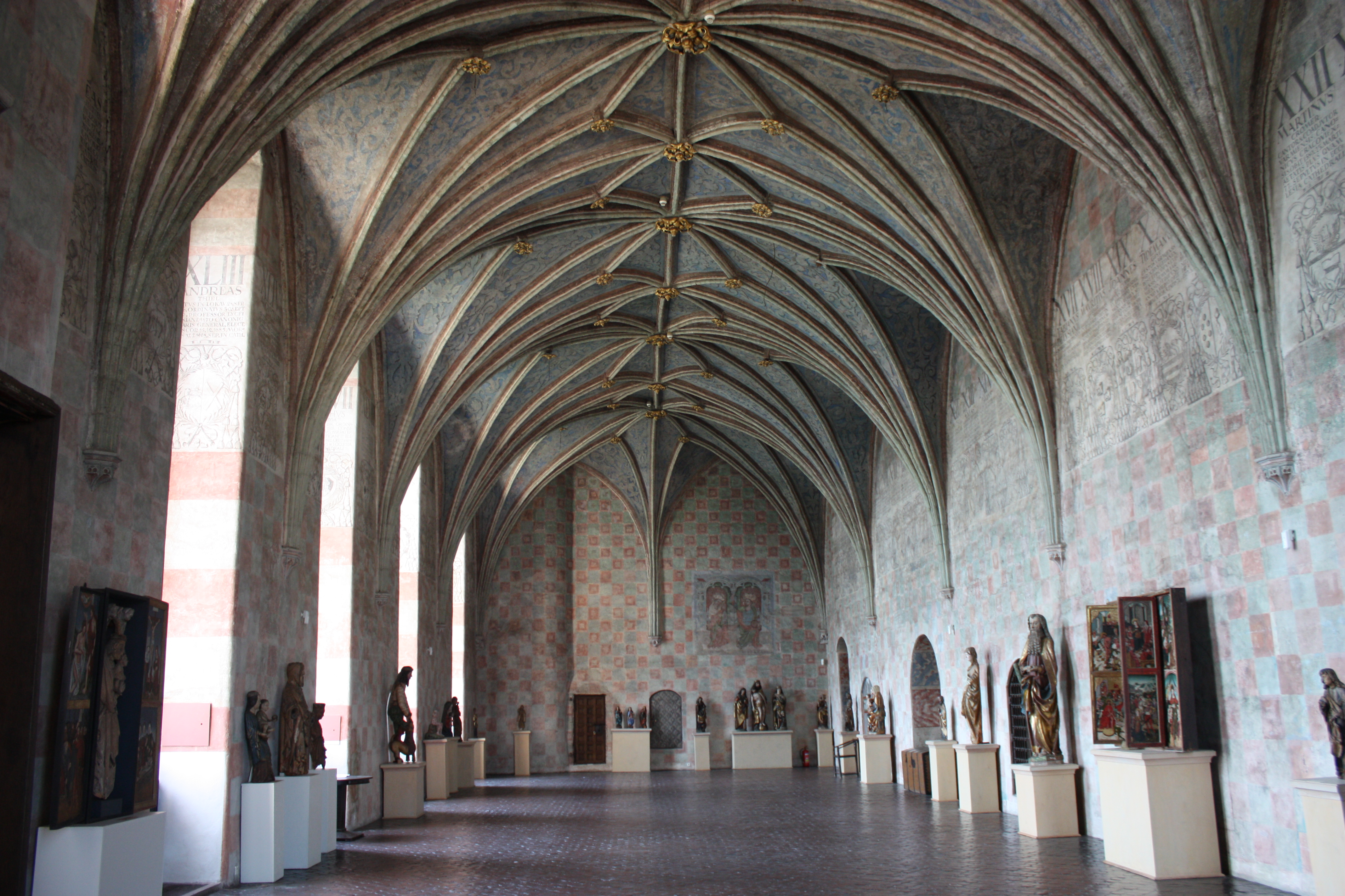 Lidzbark Warmiński, zamek biskupi, ob. muzeum, XIV, XIX